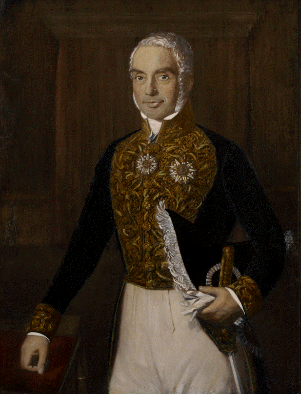 Conselheiro João Baptista Felgueiras